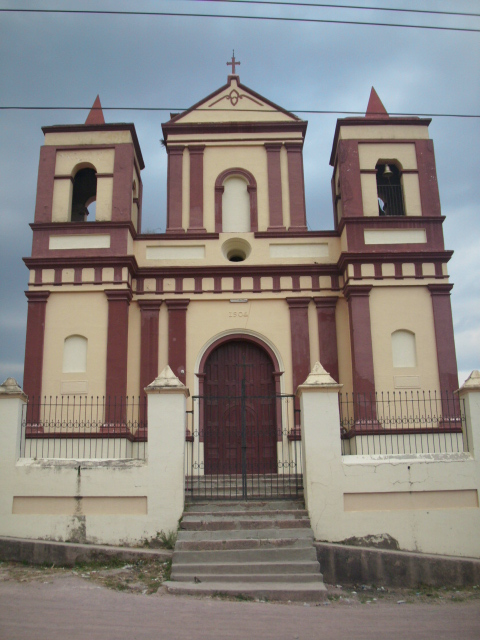 Iglesia de Tomalá, Lempira